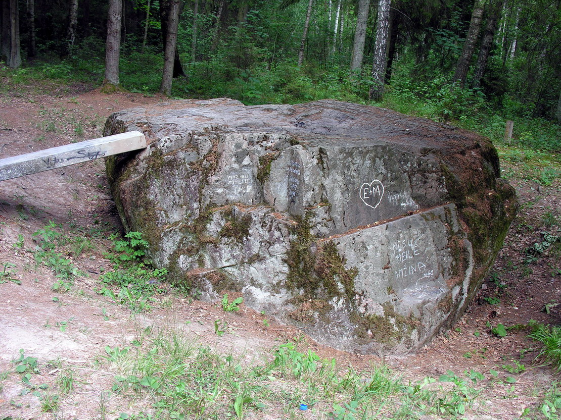 Juodasis akmuo, dar kitaip vadinamas Meilės akmeniu - geologinis gamtos paminklas, Mažeikių raj., Viekšnių sen., Žibikų miške, Ventos regioninio parko teritorijoje. Foto: Algirdas, 2006 m. liepos 12 d., Lietuva